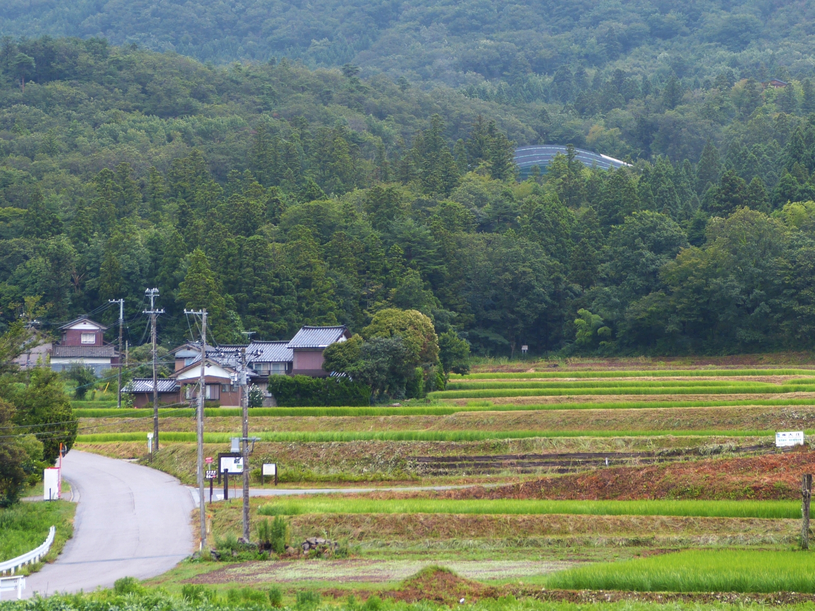 佐渡のトキ野生復帰ステーション。施設の大半は山林で隠れて見えない。中央やや右に見えるのが「順化ケージ」で、右上に見える茶色い小さな屋根が唯一一般人が立ち入ることの出来る「観察棟」。